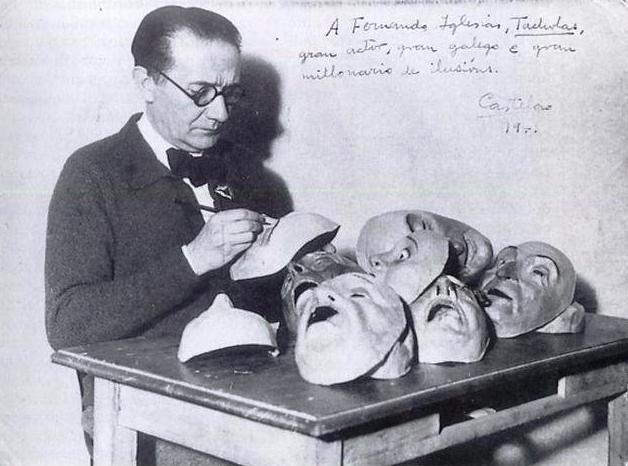 Alfonso Daniel Rodríguez Castelao en Buenos Aires, Argentina, en 1941, preparando as carautas para a representación de Os vellos non deben de namorarse.